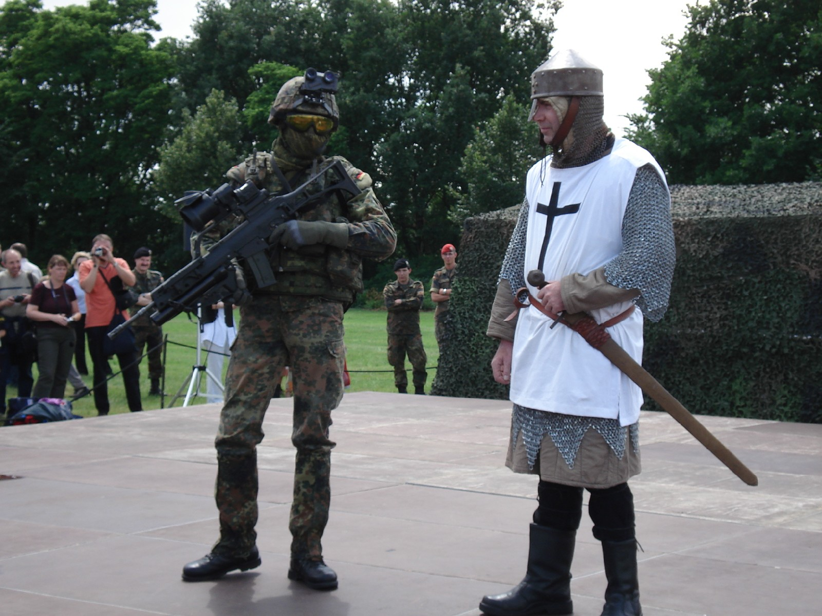 Modenschau Uniform